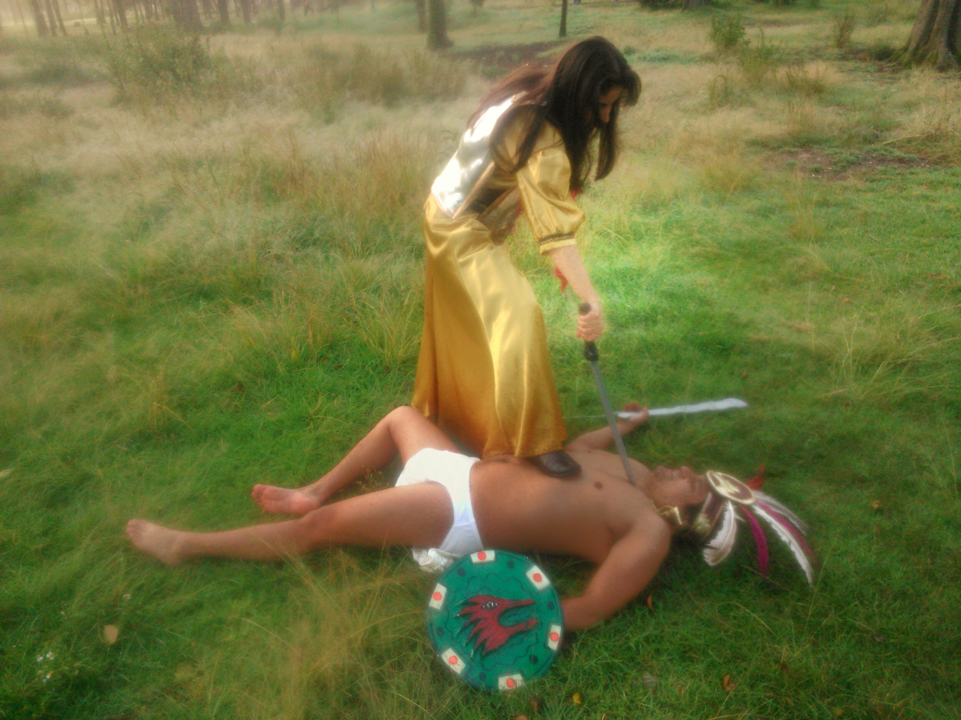 María de Estrada en batalla de Otumba contra guerrero Mexica.